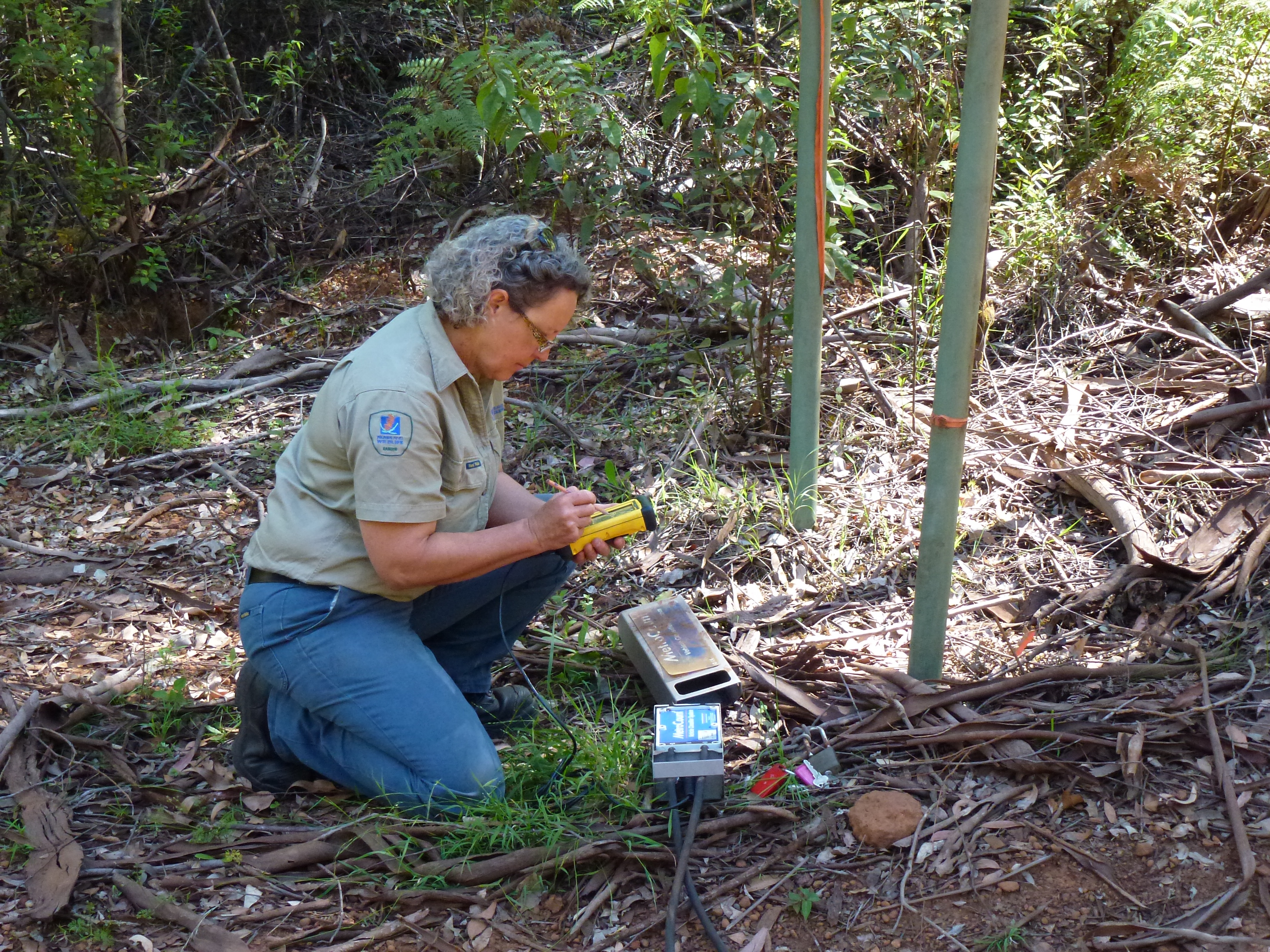 Western Australia Parks and Wildlife National Park Rangers assessing public frequentation on a Metro Counter, Warren National Park, Donnelly District, December 2014.